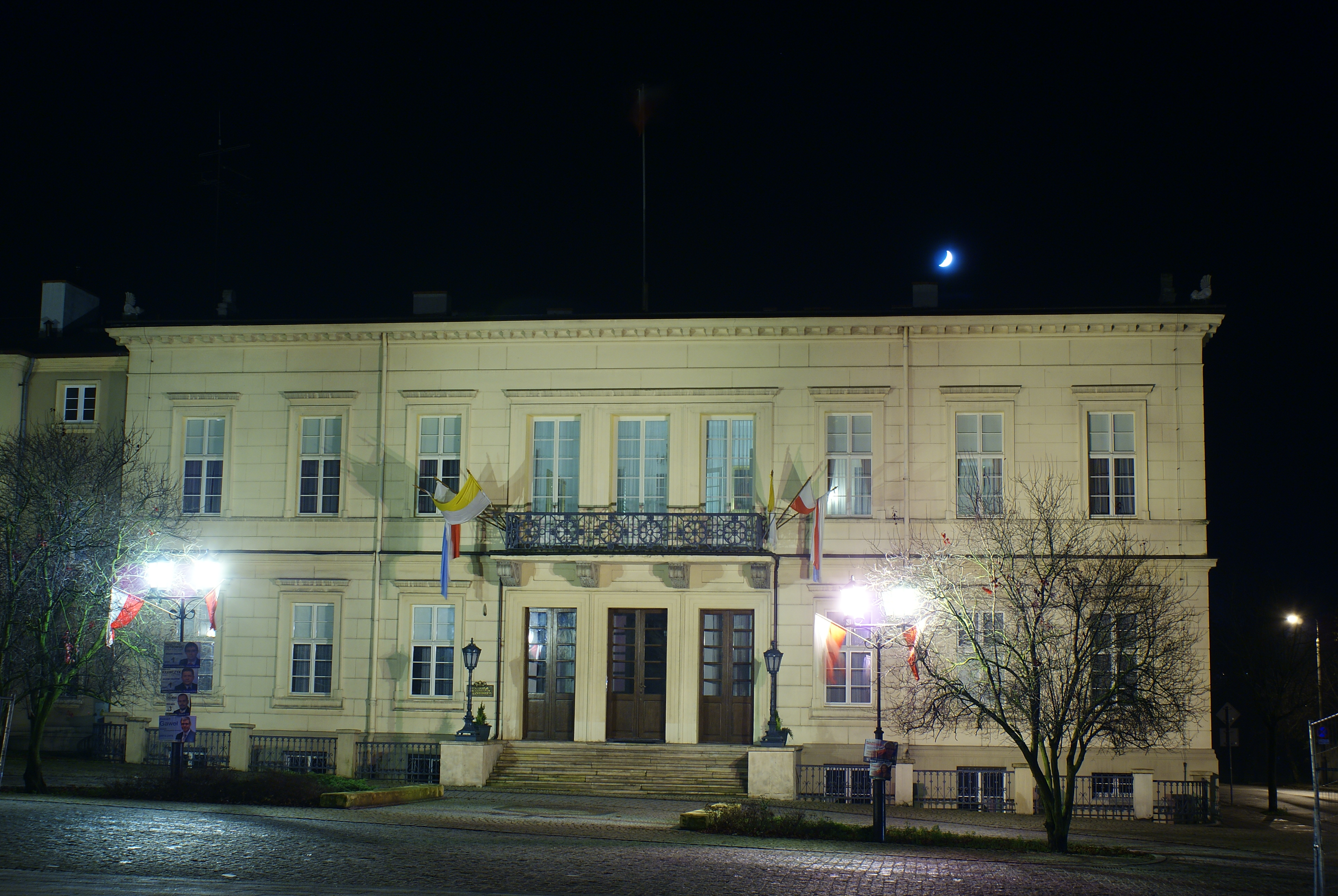 Gniezno, ul. Łaskiego 7 - Pałac Arcybiskupi z 1830, 1928 r.